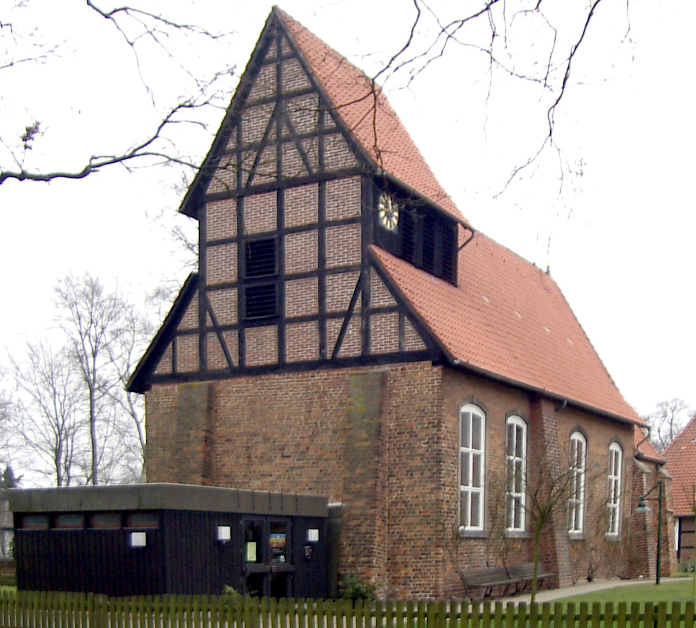 evangelische Kirche St. Marien in Wathlingen